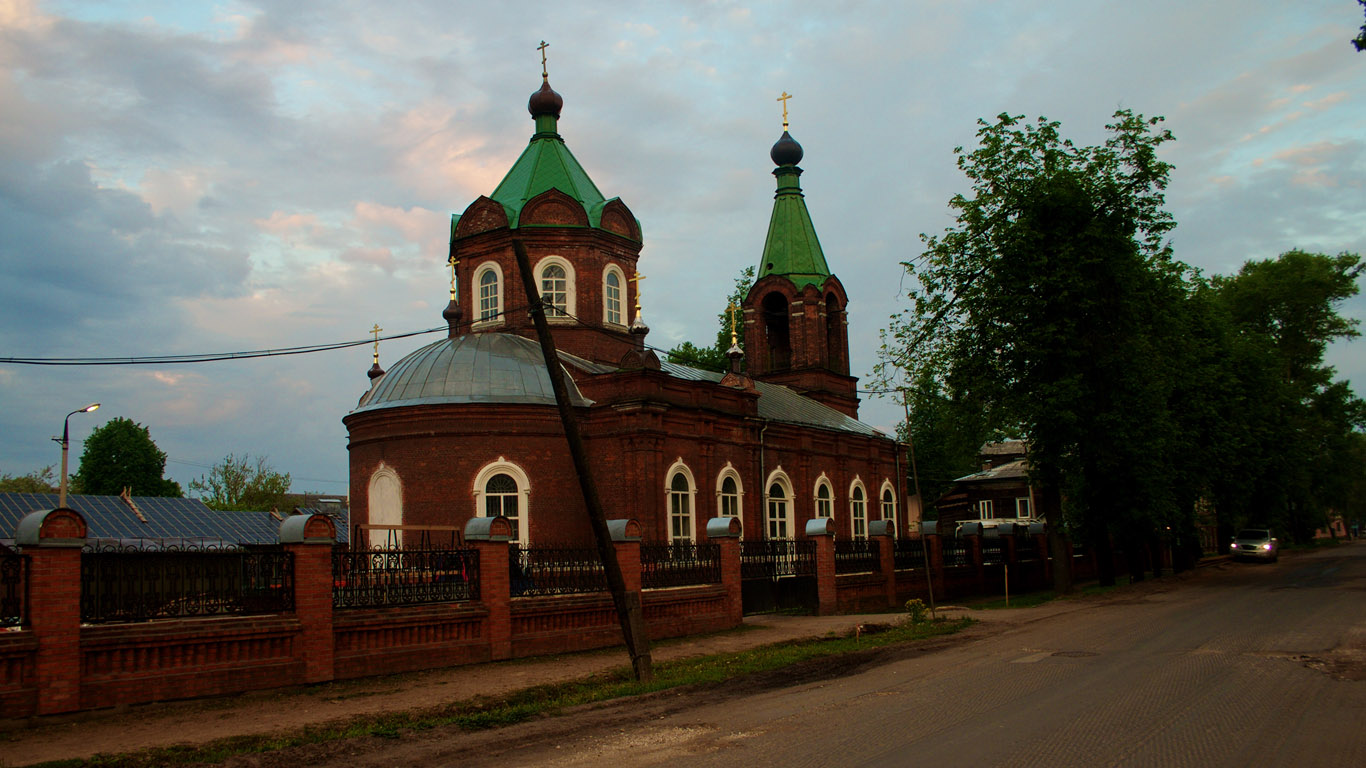 Ржевская Старообрядческая община. Храм Покрова Пресвятыя Богородицы